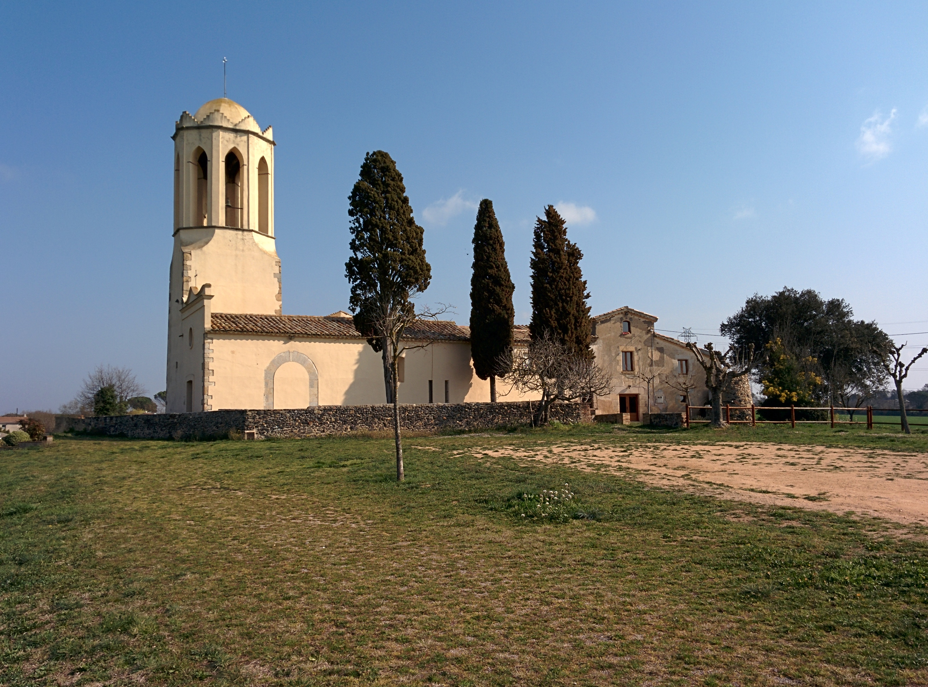 Església de Santa Eulàlia de Vallcanera (Sils)